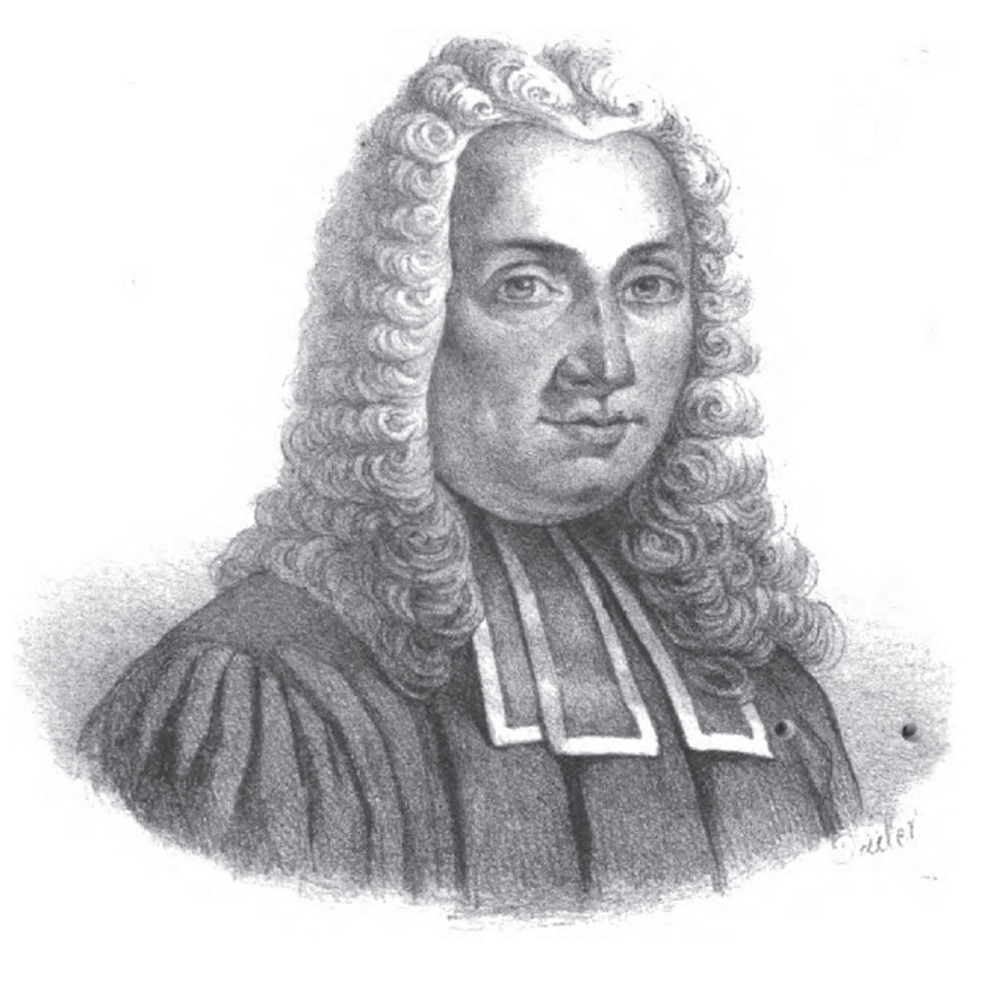 Pierre Taffin (1664-1745)